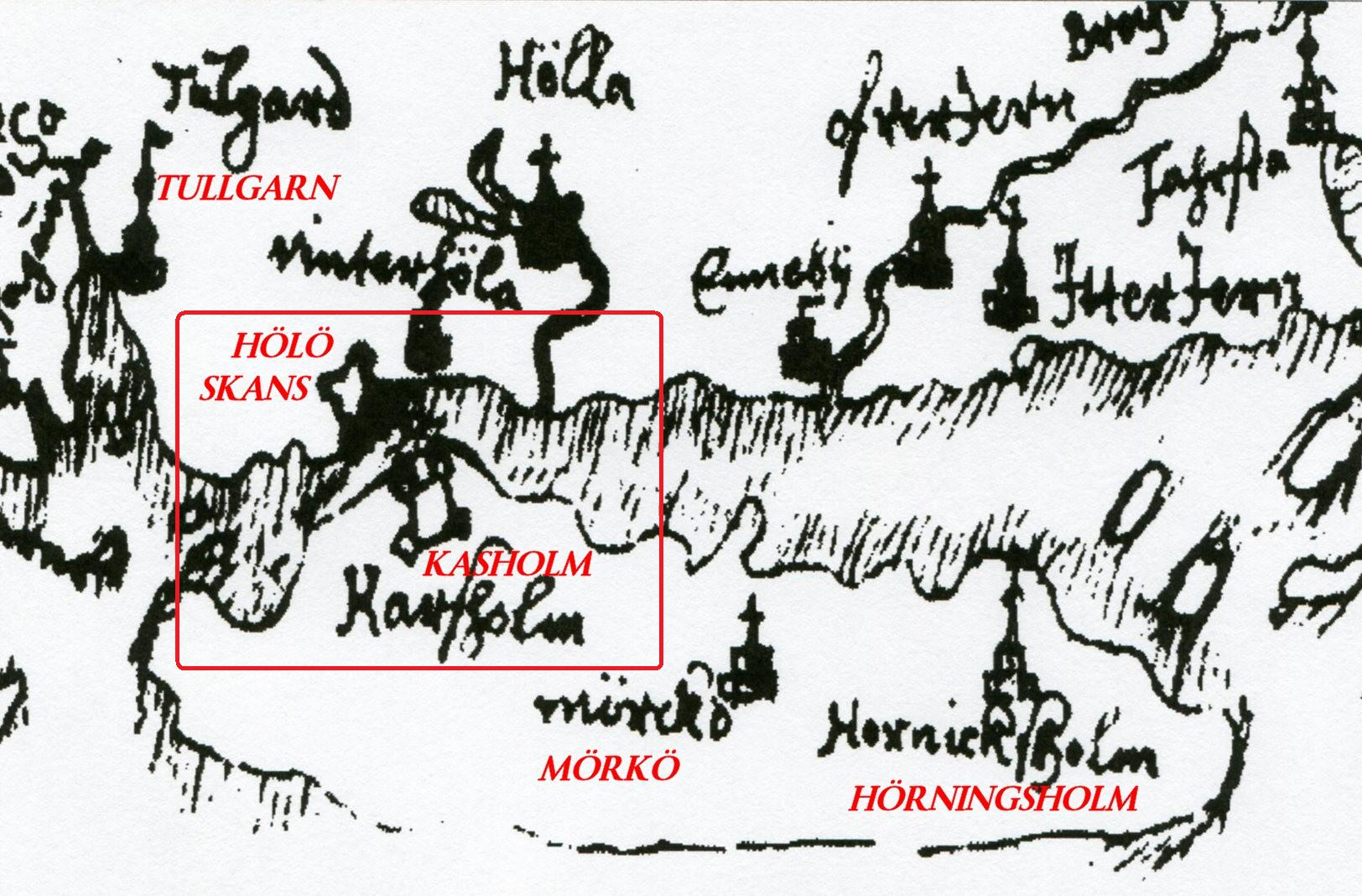 Skansarna på ömse sidorna av Pålsundet vid Kasholmen och Hölö finns med på ”Ryska kartan” från 1600-talets mitt, norr är åt höger.